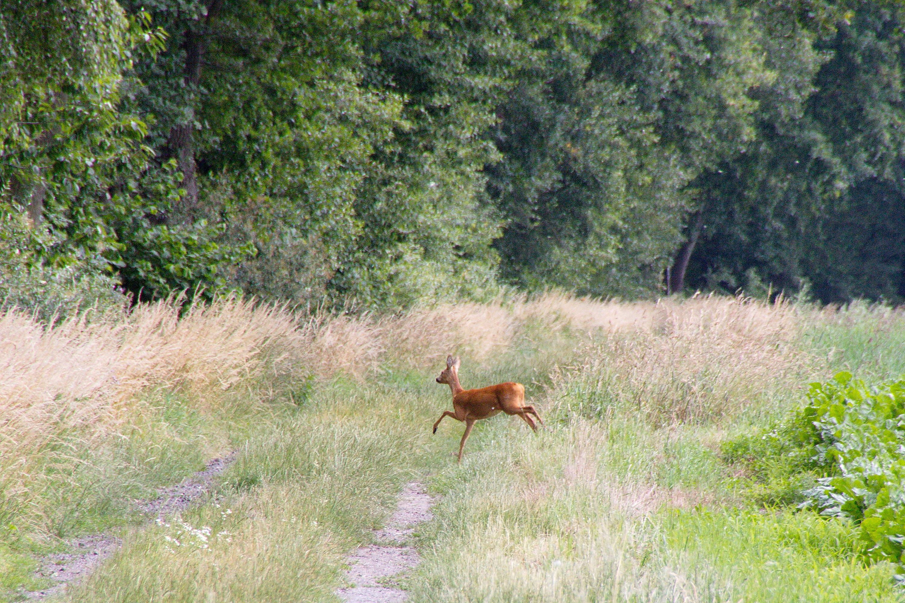 Naturschutzgebiet Schwarzwasserniederung in Niedersachsen, Deutschland